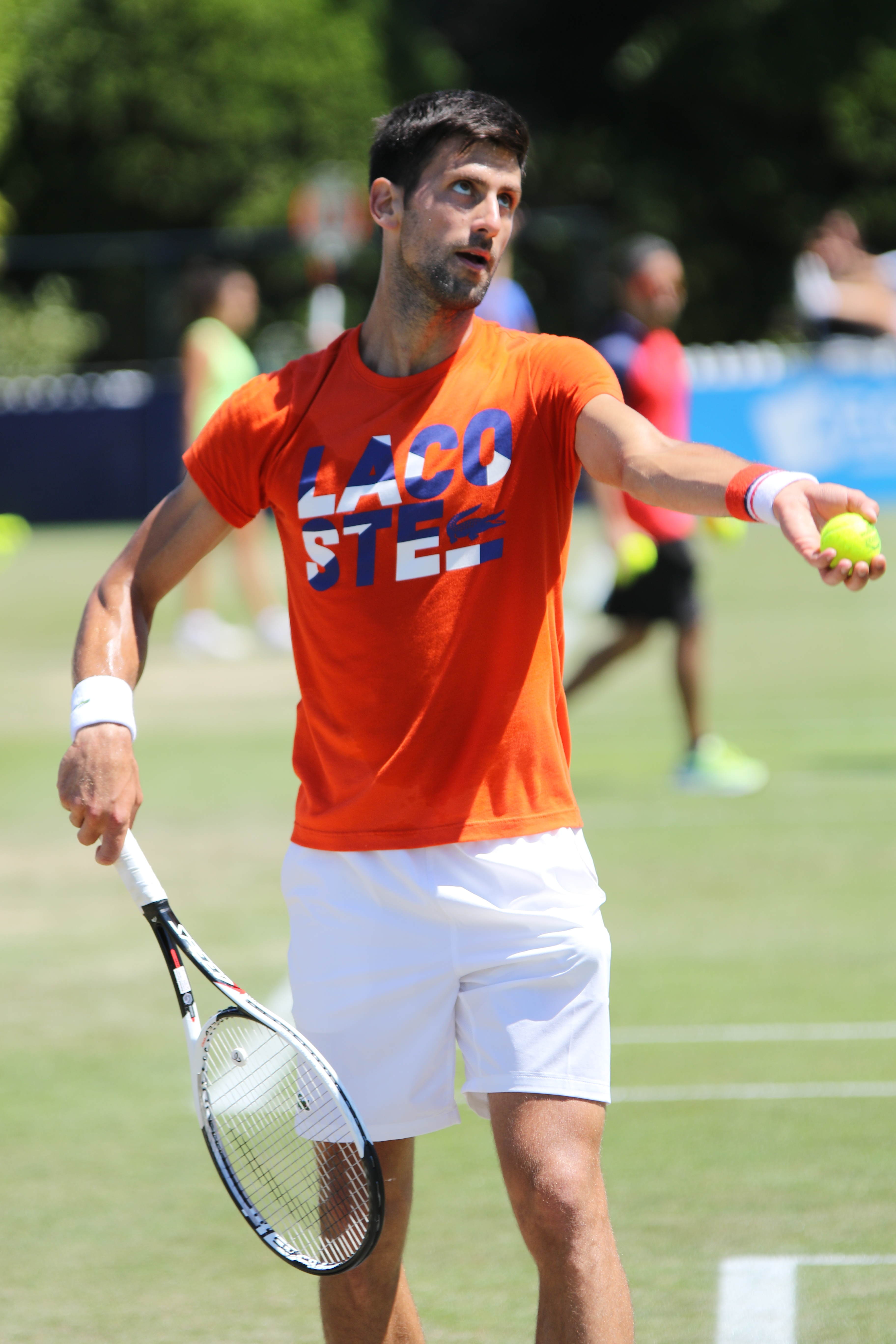 Novak Djokovic